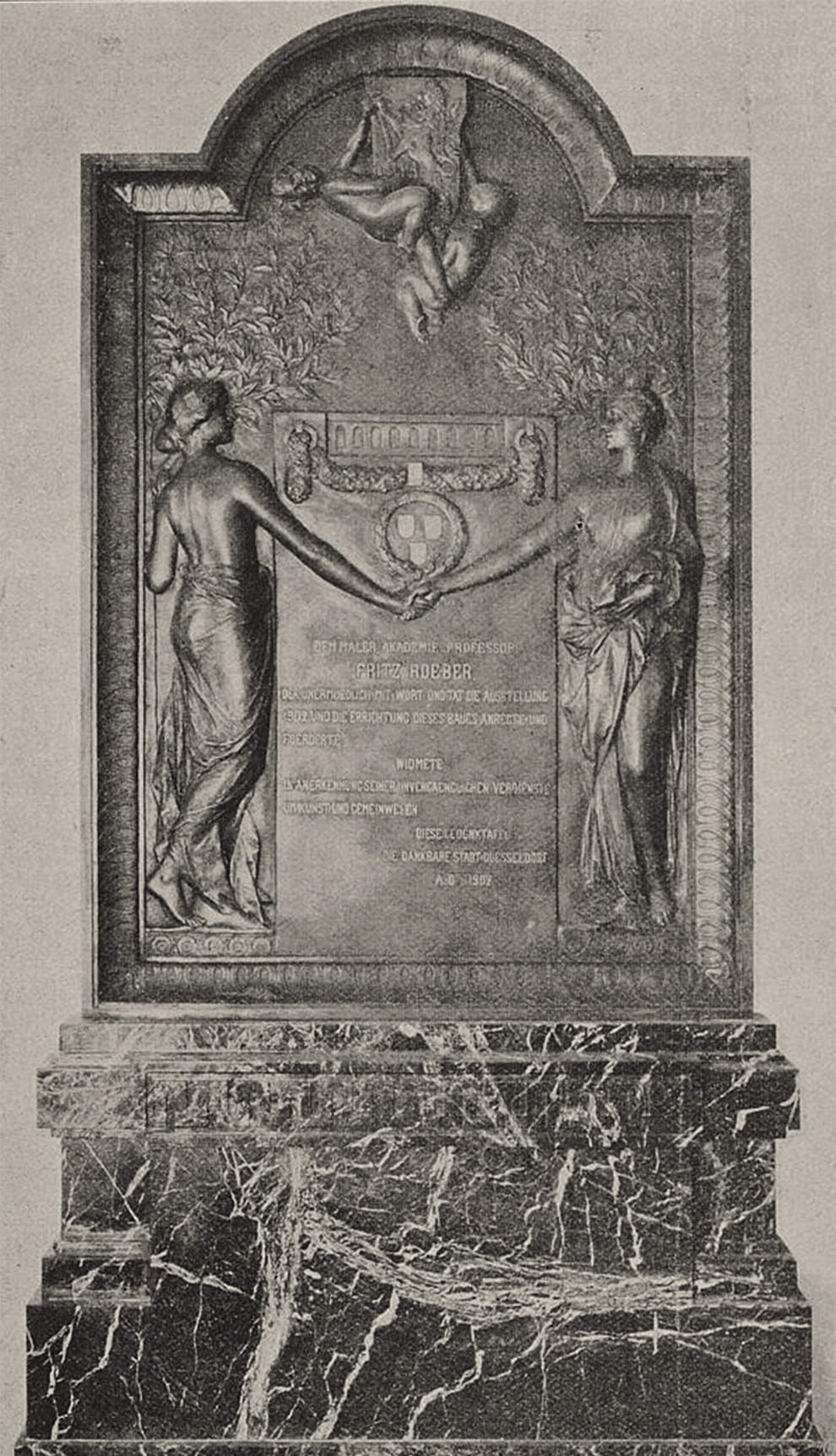 Gedenktafel für Professor Fritz Roeber im Kunstpalast als Erinnerungszeichen für seine Verdienste um die Kunstausstellung 1902. Wurde Anfang 1904 angebracht; Entwurf Bildhauer Heinz Müller; Bronzegießerei „Förster & Kracht“ in Düsseldorf-Oberkassel.